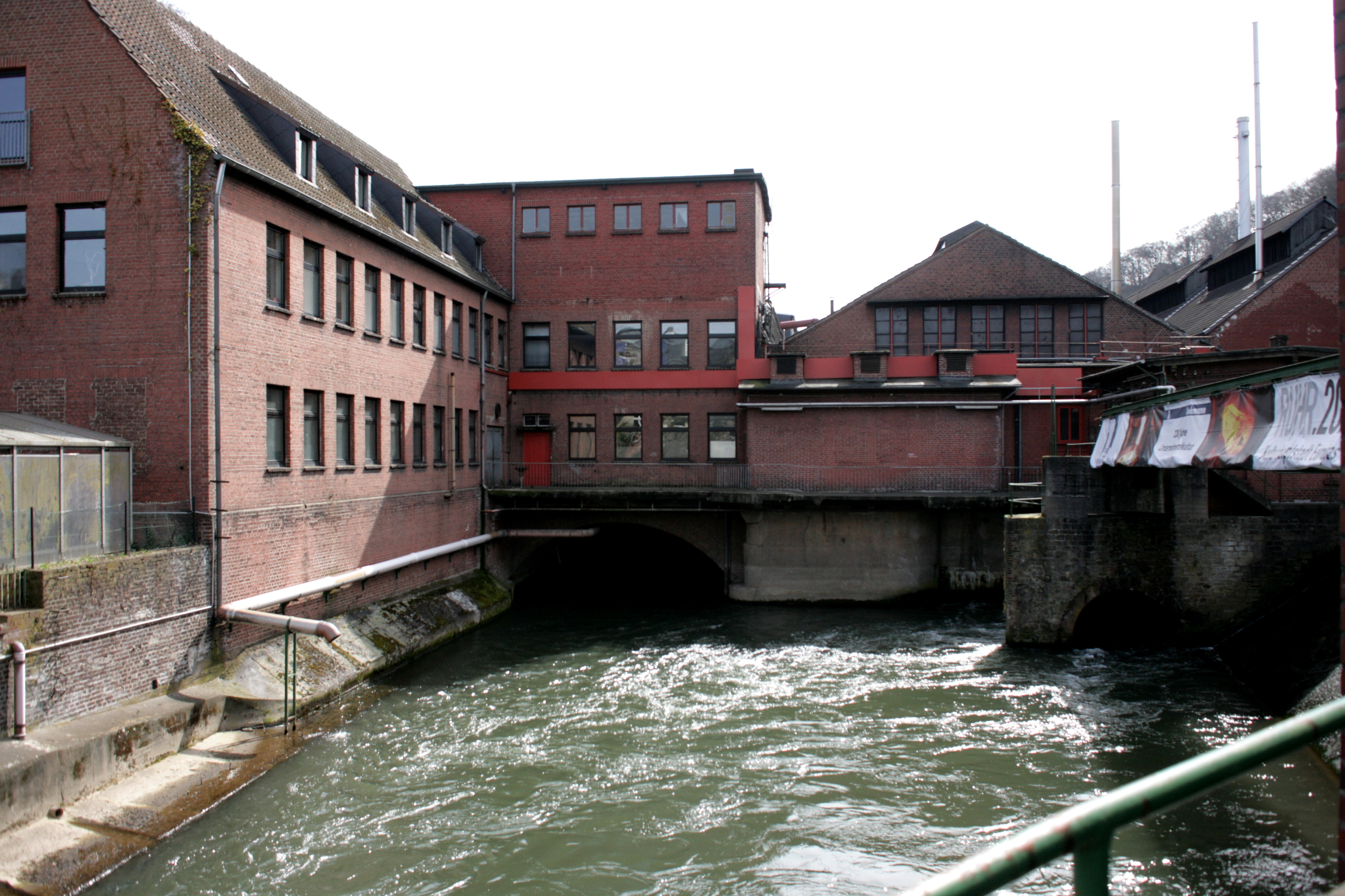 Friedr. Lohmann GmbH, Ruhrtal in Witten-Herbede